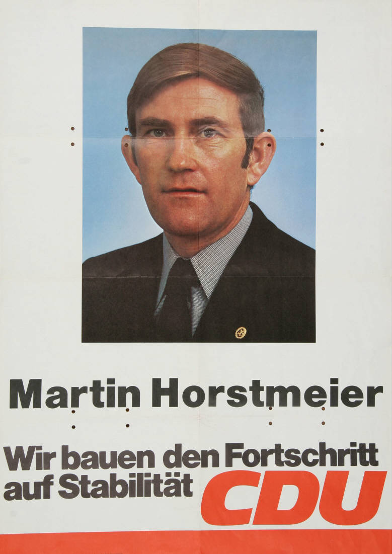 Martin Horstmeier Slogan Abbildung: Porträtfoto Plakatart: Kandidaten-/Personenplakat mit Porträt Auftraggeber: Verantw.: CDU Bonn Drucker_Druckart_Druckort: Rheinisch-Bergische Druckerei- und Verlagsgesellschaft mbH, Düsseldorf Objekt-Signatur: 10-001: 1746 Bestand: Plakate zu Bundestagswahlen (10-001) GliederungBestand10-18: Plakate zu Bundestagswahlen (10-001) » Die 7. Bundestagswahl am 19. November 1972 » CDU » Mit Porträtfoto Lizenz: KAS/ACDP 10-001: 1746 CC-BY-SA 3.0 DE